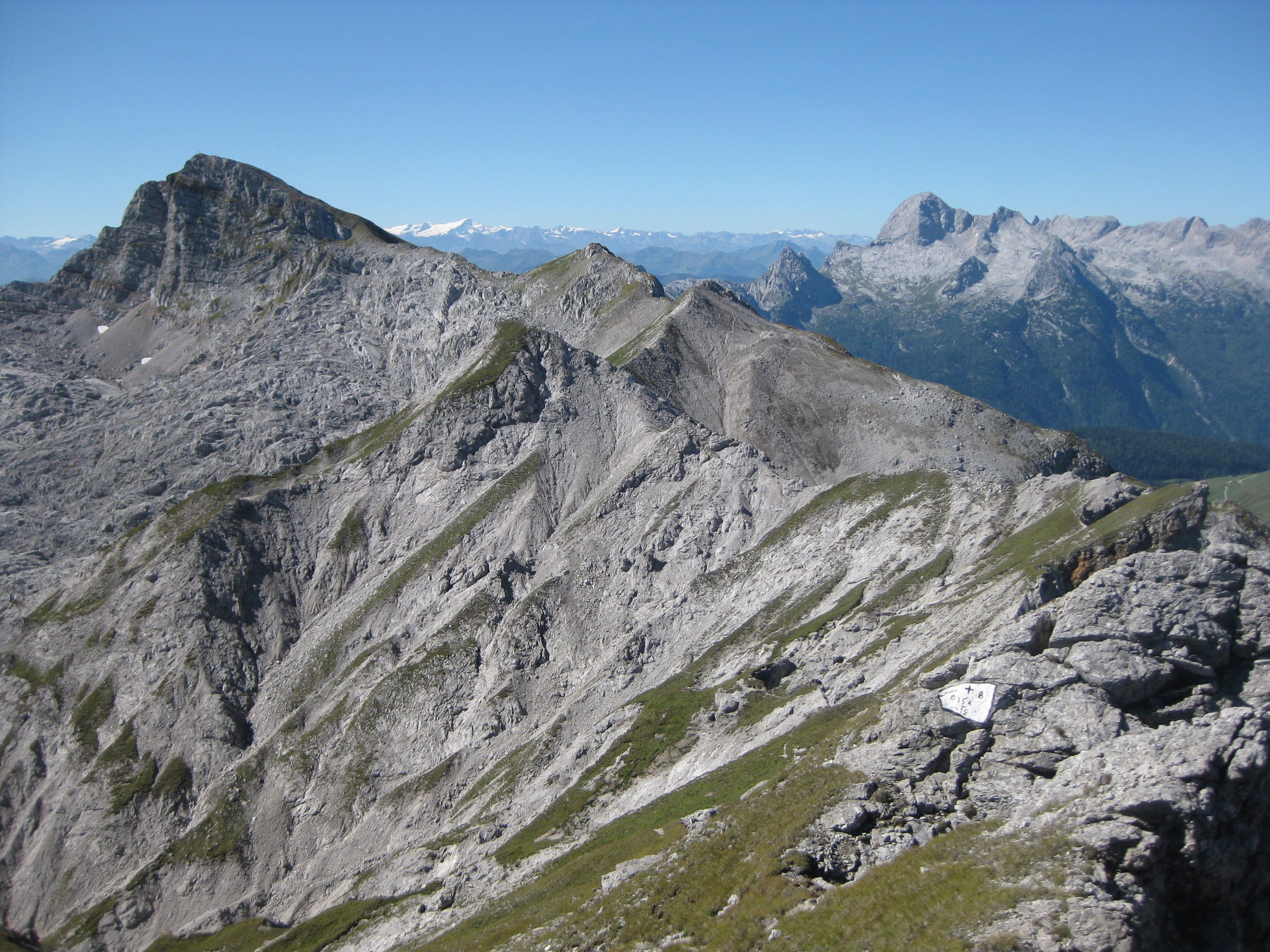 Seehorn in den Berchtesgadener Alpen, gesehen vom Großen Palfelhorn. Dahinter die Leoganger Steinberge.